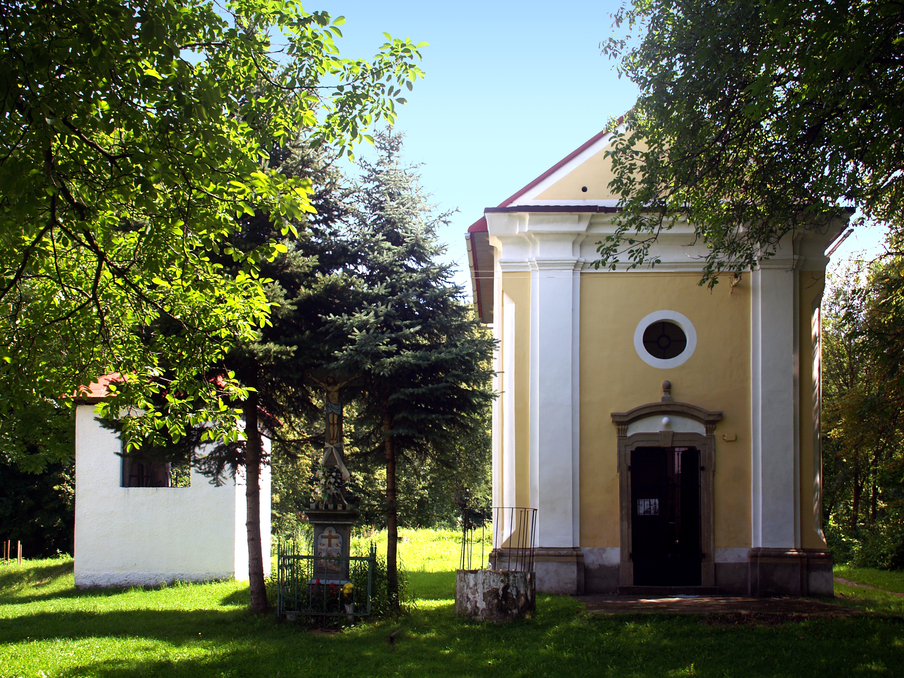 Krásny Brod, Prešov (Slovaquie) - Chapelle dédiée à la Très-sainte-Mère de Dieu This medium shows the protected monument with the number 705-130/2 in the Slovak Republic.